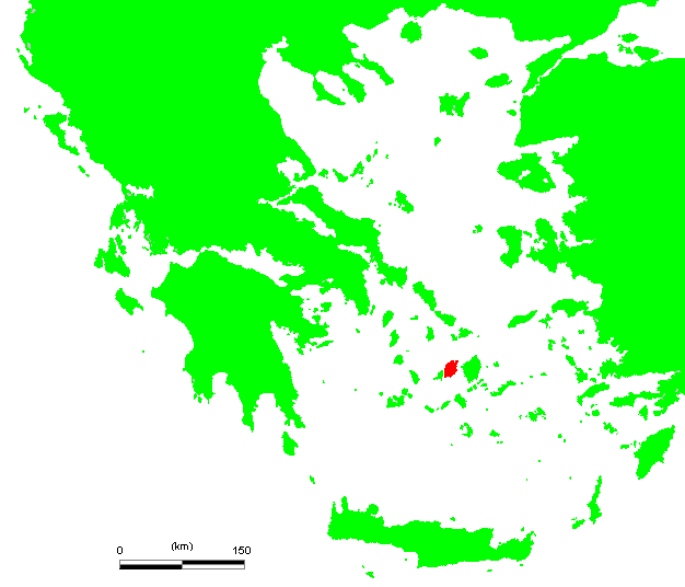 GR Paros.PNG (Greek island)